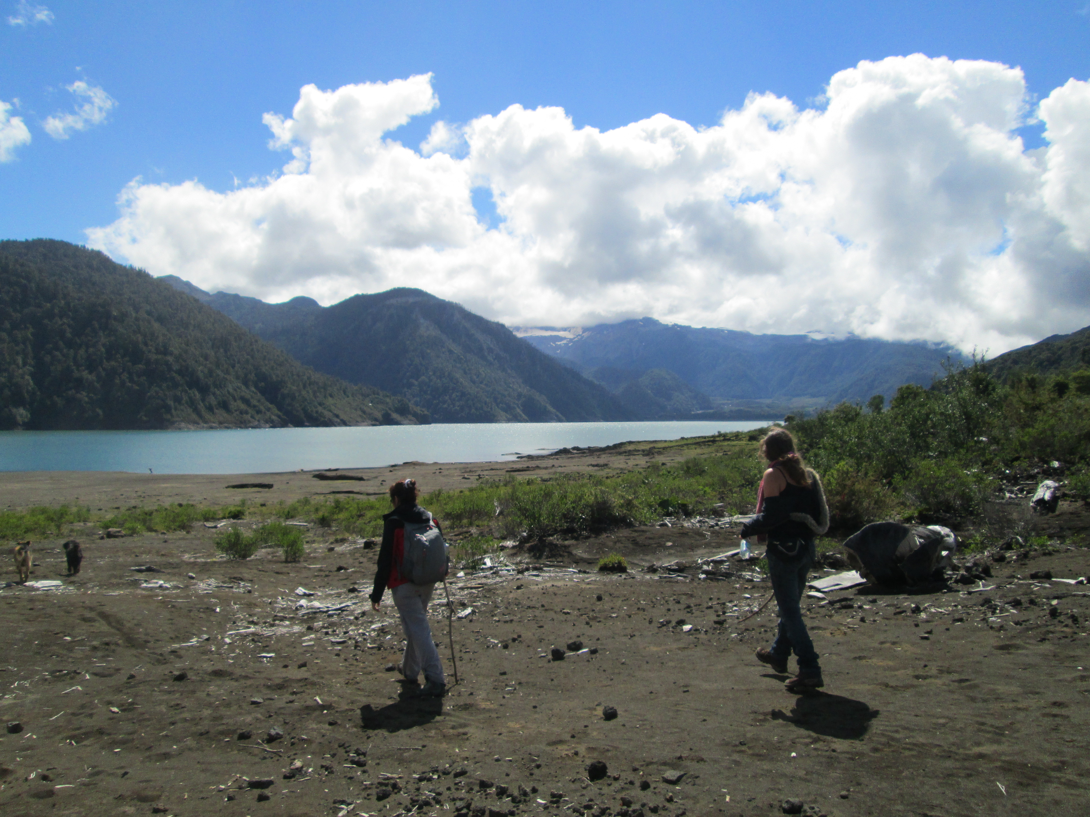 Fotografía del Lago Cabrera, el cual yace en una zona de muy difícil acceso en el sur de Chile. Sus aguas provienen de la cordillera de Los Andes y debido a la soledad del entorno, se pueden encontrar rocas sedimentarias en formación temprana. Es un lugar hermoso y recogedor.